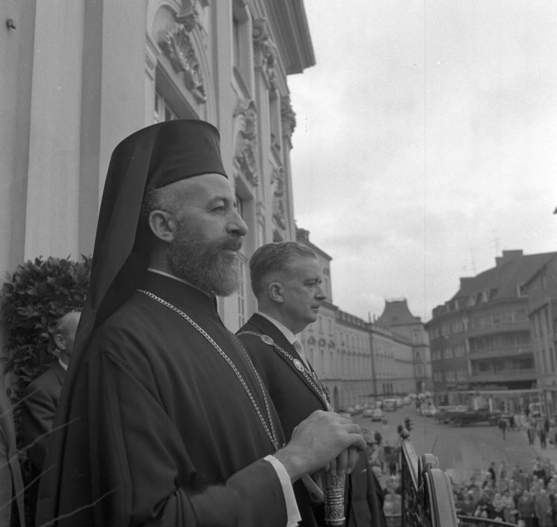 Staatsbesuch Zypern Eintragung in das Goldene Buch der Stadt Bonn